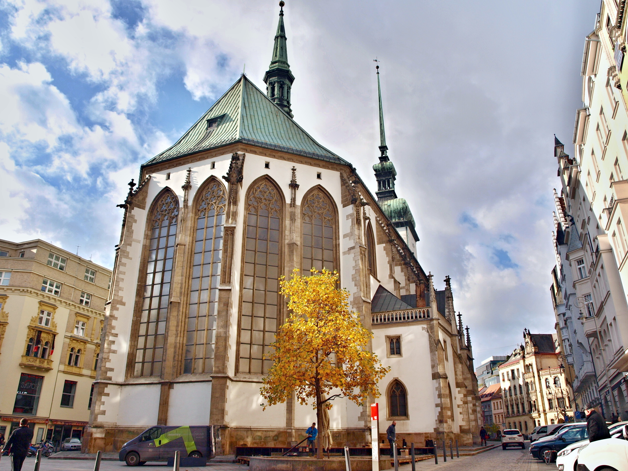 Brno, kostel sv. Jakuba